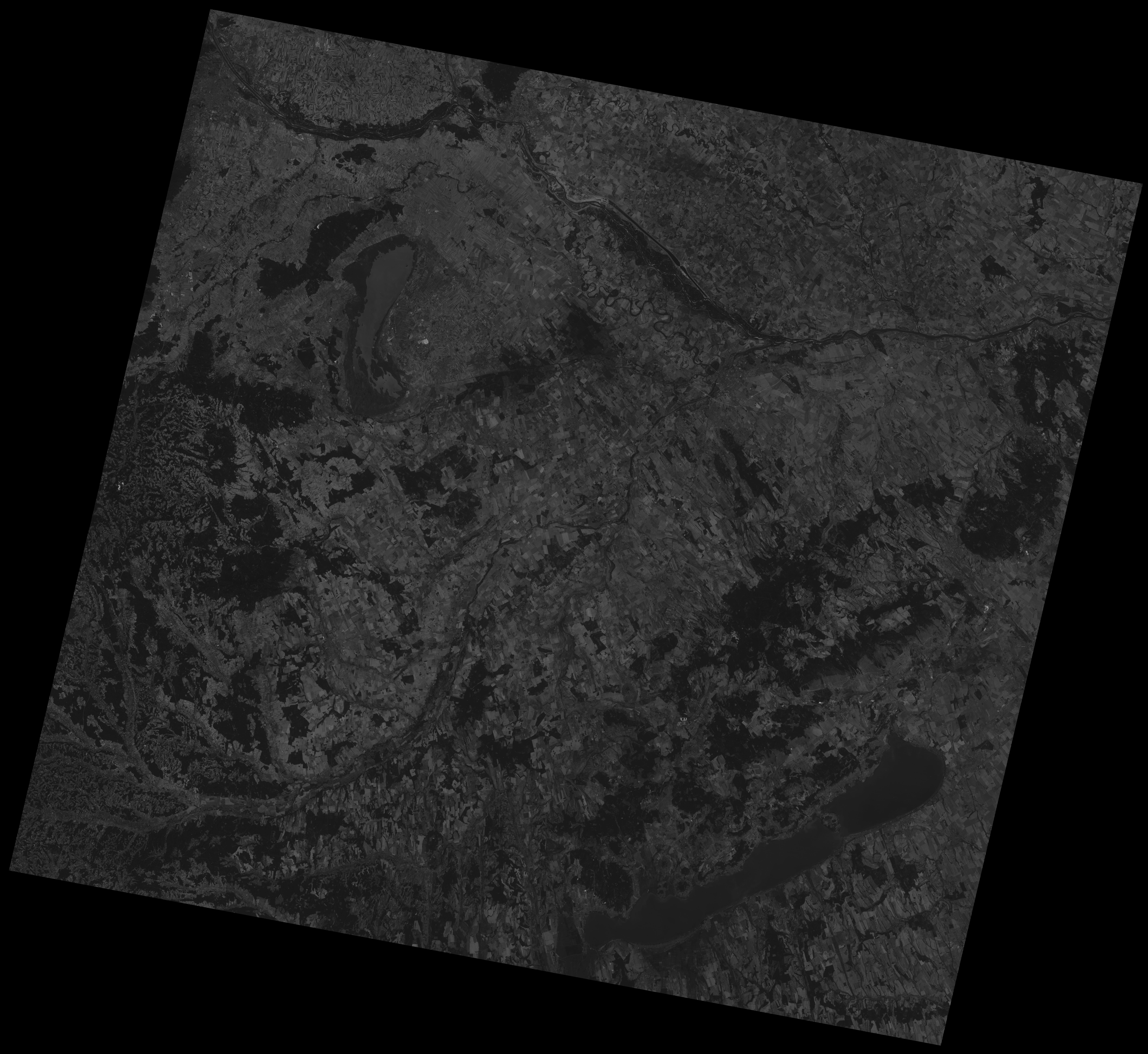 A Landsat-5 felvétele az Észak-Dunántúlról a vörös (3-as) sávban